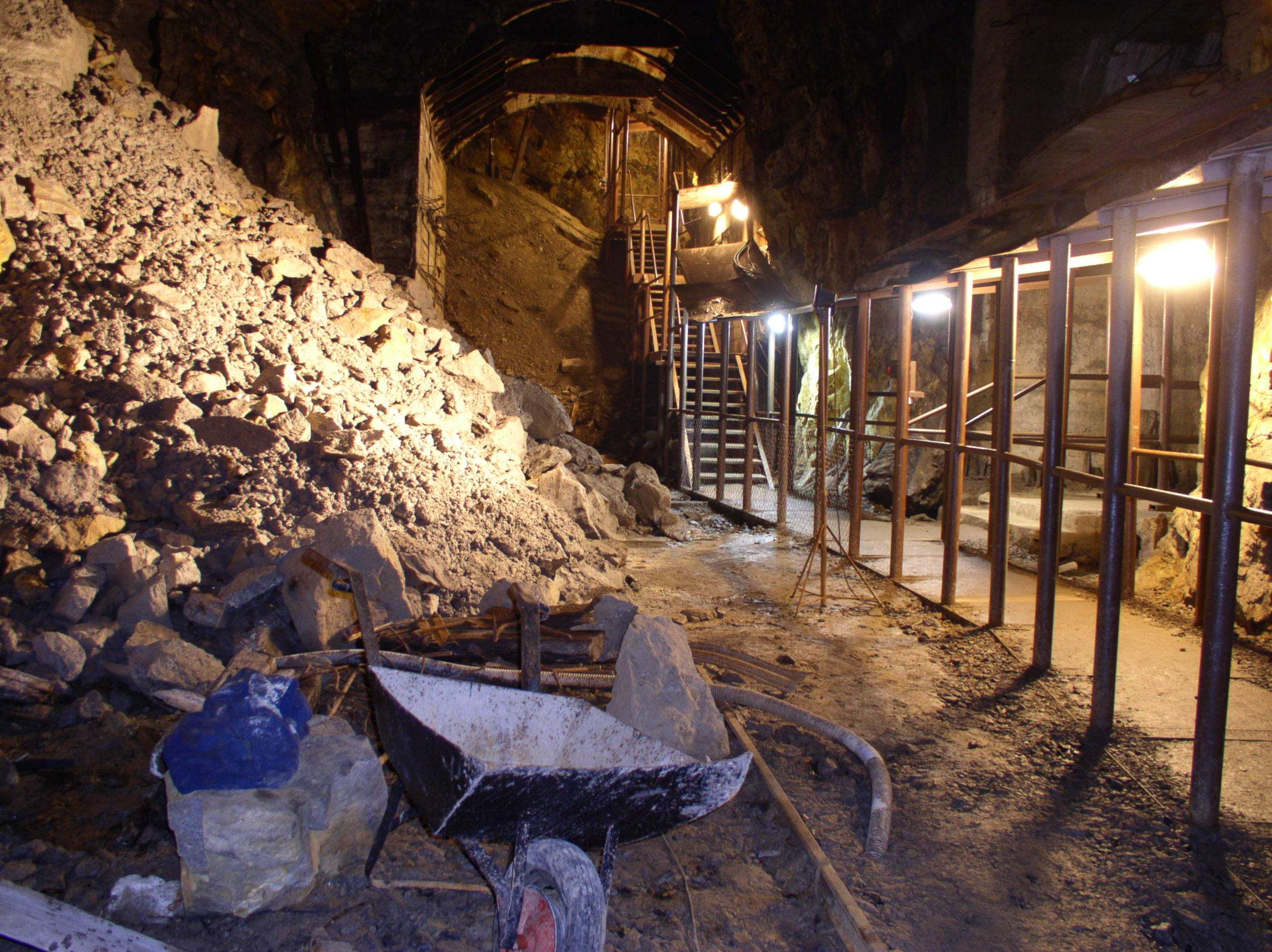 Góry Sowie, Sztolnie - wejście od Rzeczki, 25 listopada 2003 pstryknięte przez Borcha3kawki